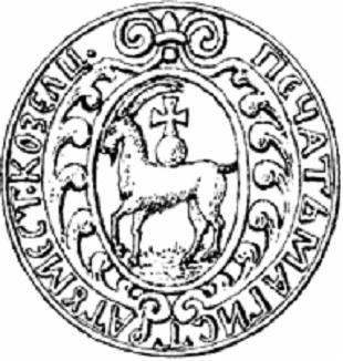 "ПЕЧАТЬ МАГИСТРАТУ МЕСТ. КОЗЕЛЦ"